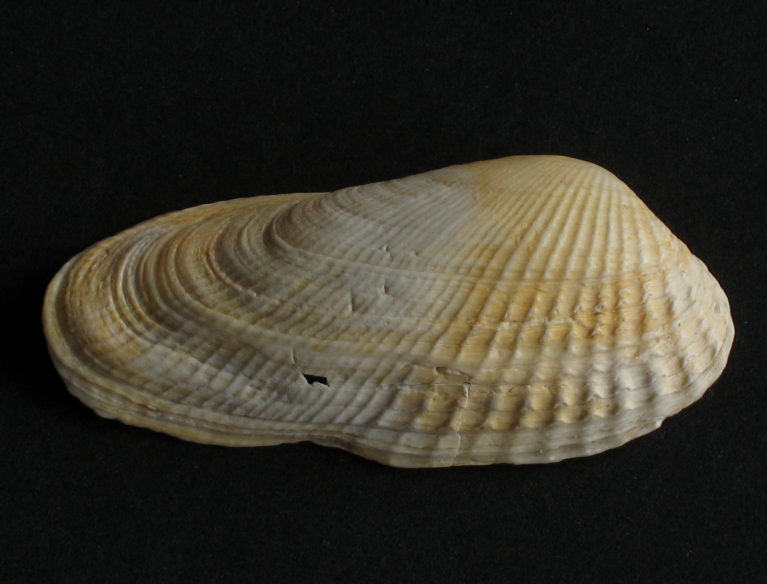 Petricola pholadiformis - amerikanische Bohrmuschel